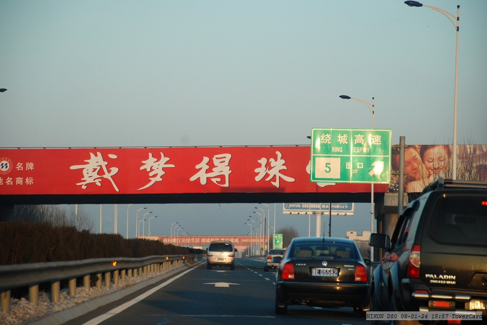 机场高速